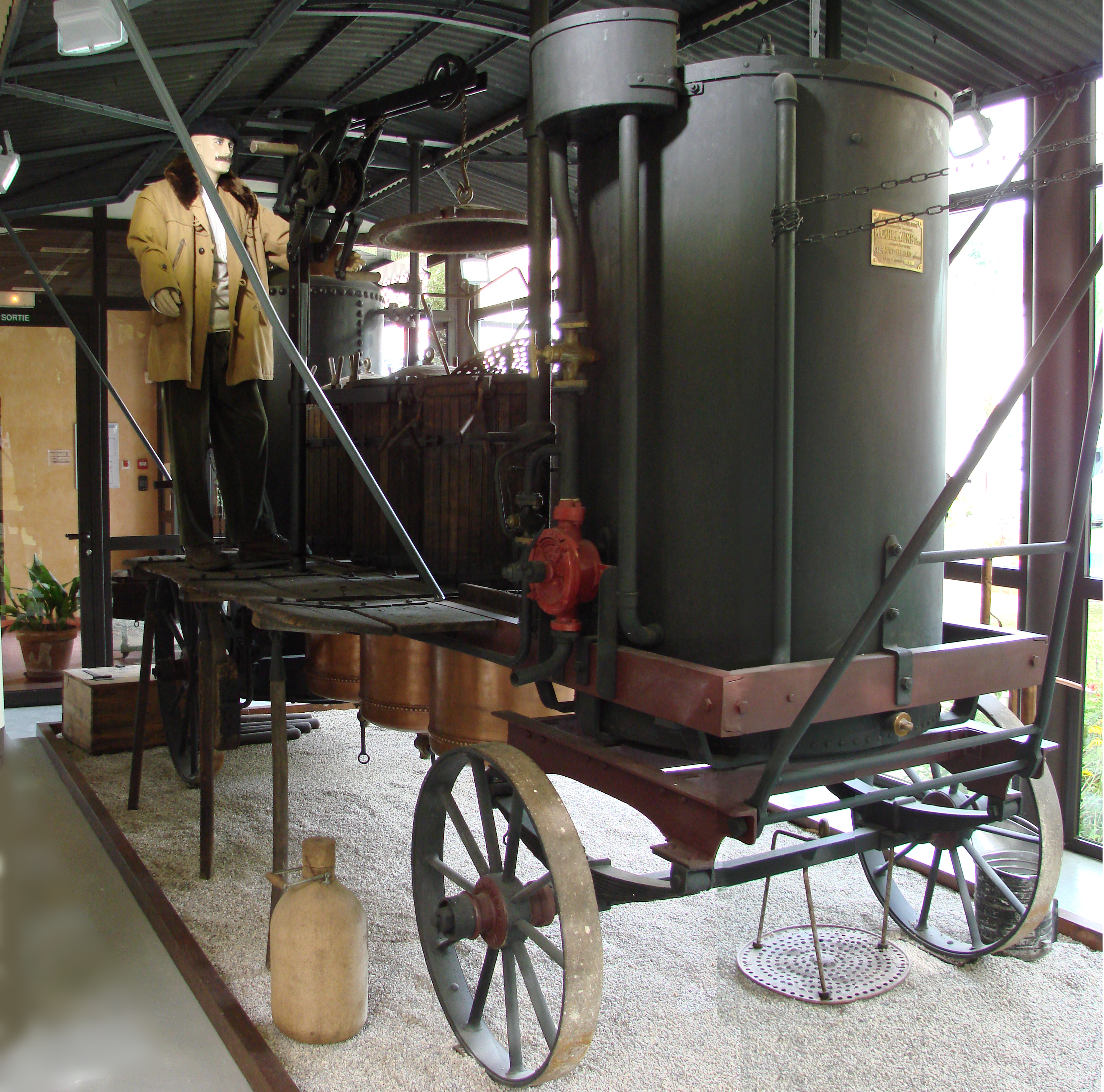 Alambic mobile présenté au musée des traditions bugistes, Saint-Rambert-en-Bugey, France